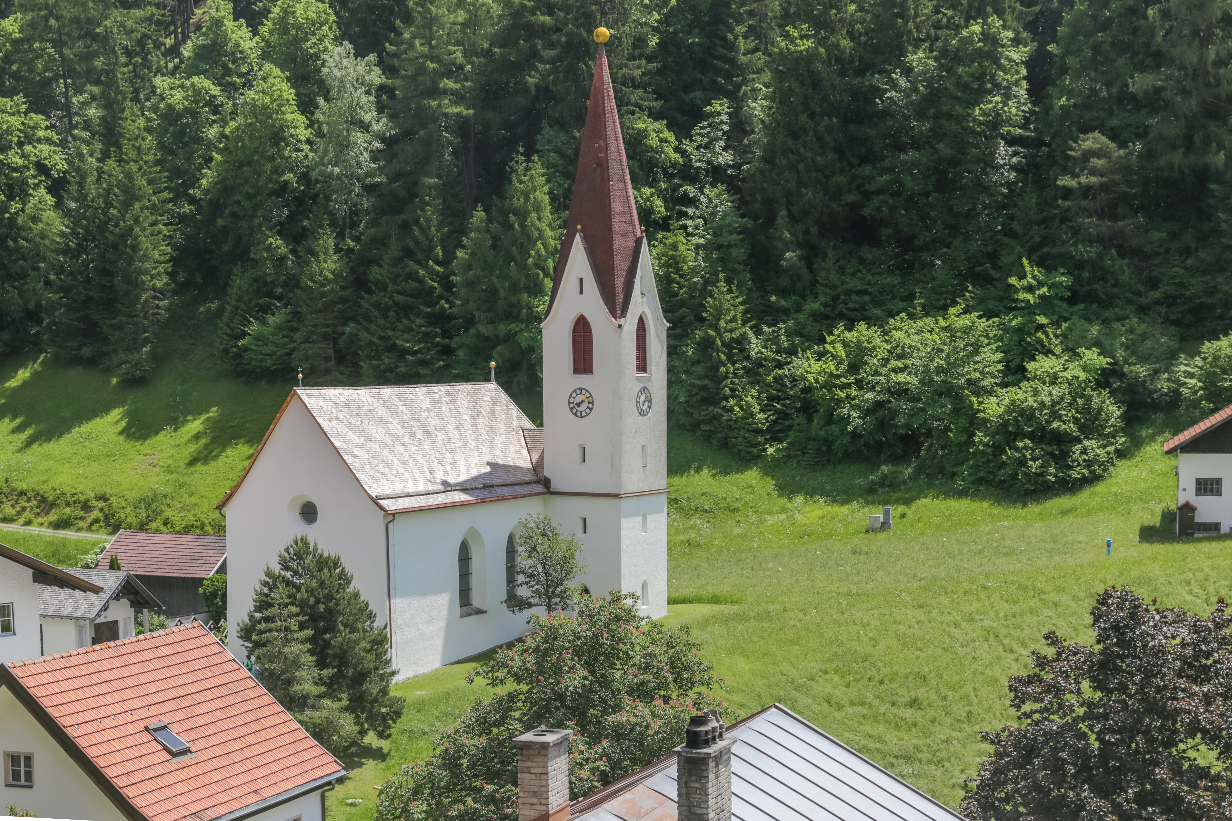 AT 69832 Kath. Filial- und Wallfahrtskirche Mariahilf, Kaplaneikirche Kronburg, Zams